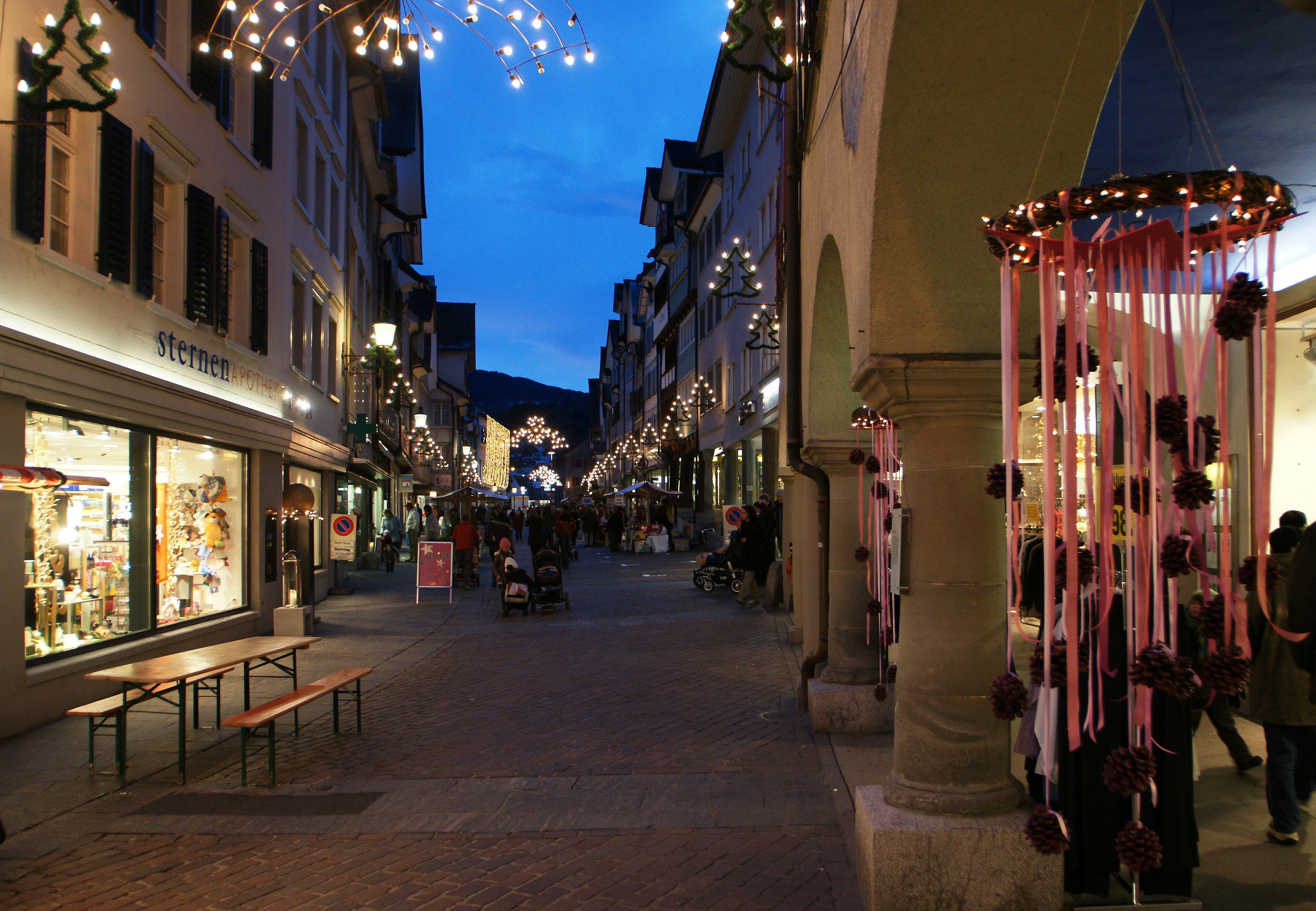 Im "Städtle" von Altstätten.